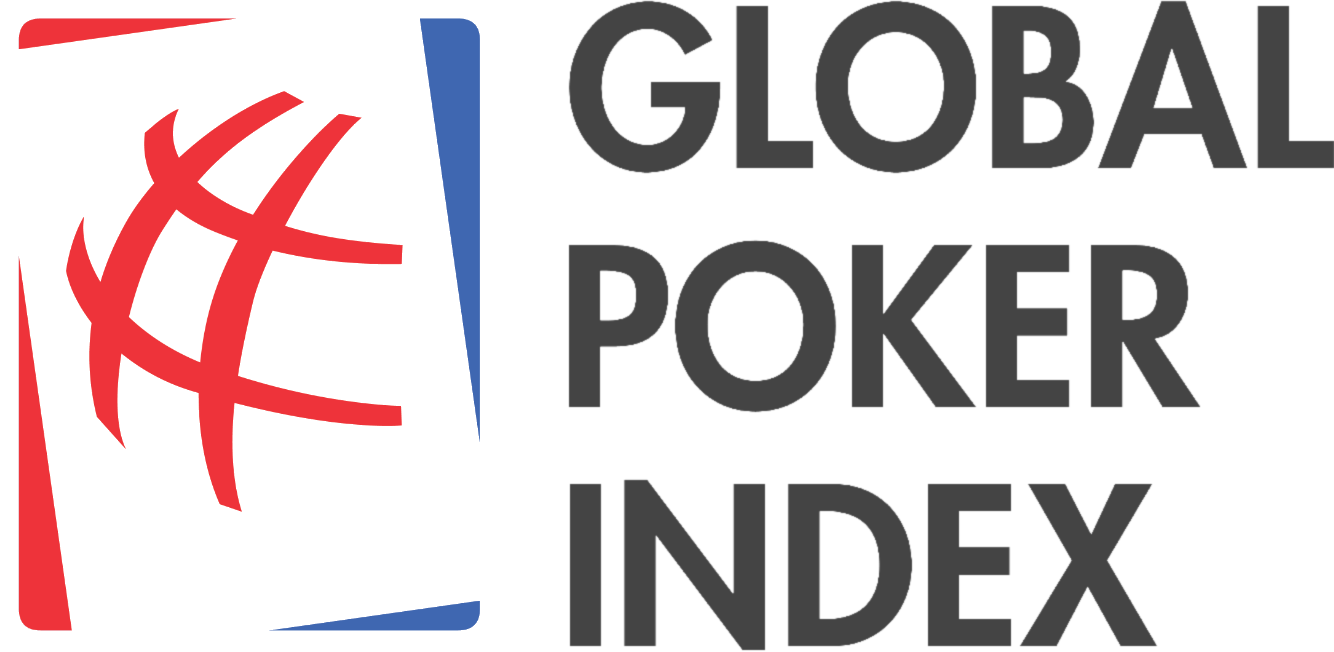 Logo des Global Poker Index